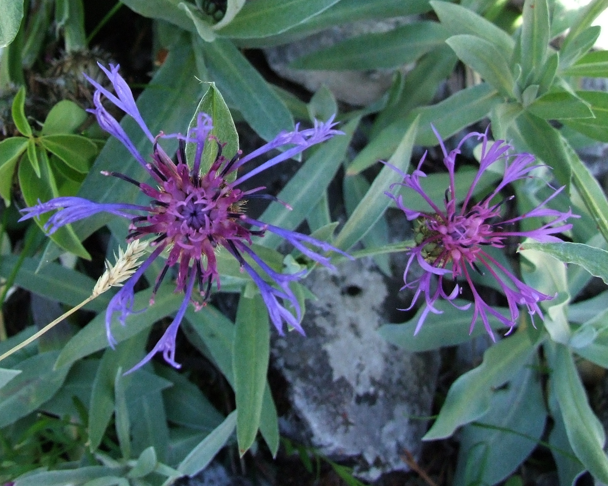 Centaurea triumfetti (habitat:Pieniny)